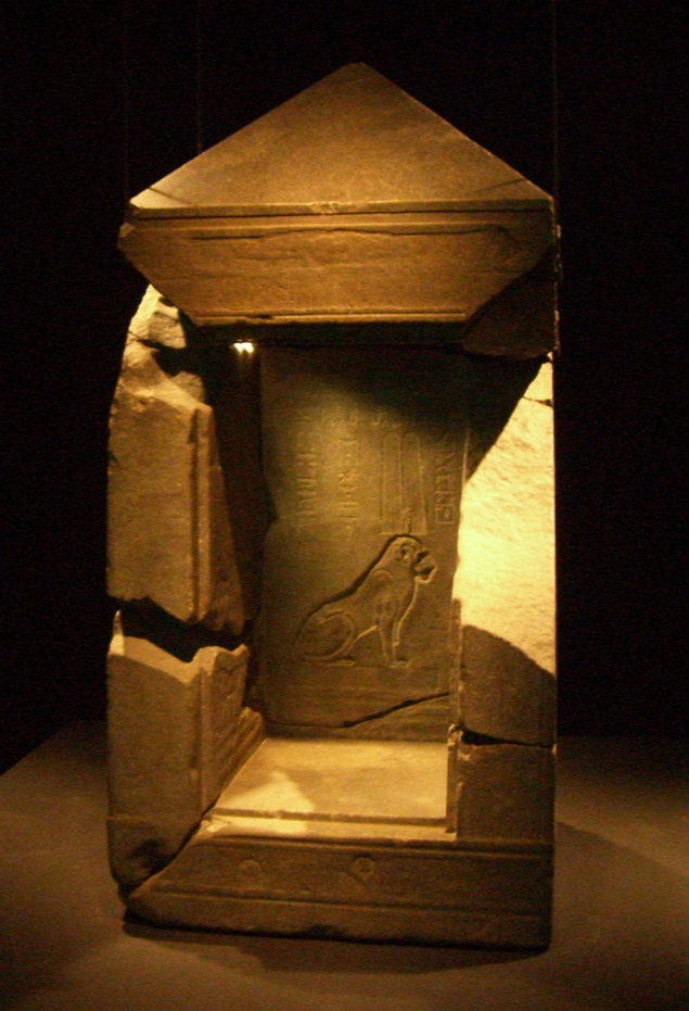 Naos des Décades reconstitué à l'occasion de l'exposition "Trésors engloutis d'Egypte" en 2006 au Grand Palais - Règne de Nectanebo Ier, 30e dynastie